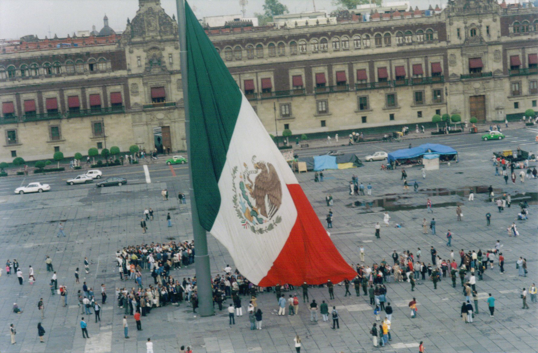 Izando la bandera monumental del Zócalo (tal vez el 30 de septiembre para el nacimiento de José Ma. Morelos?)